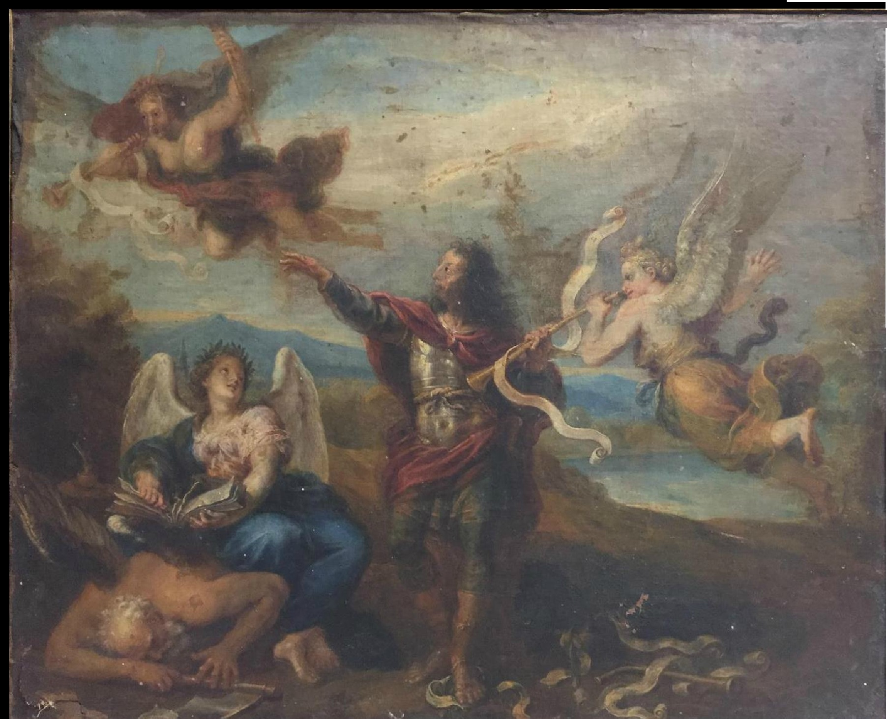 Le Repentir du Grand Condé, esquisse, localisation inconnue.